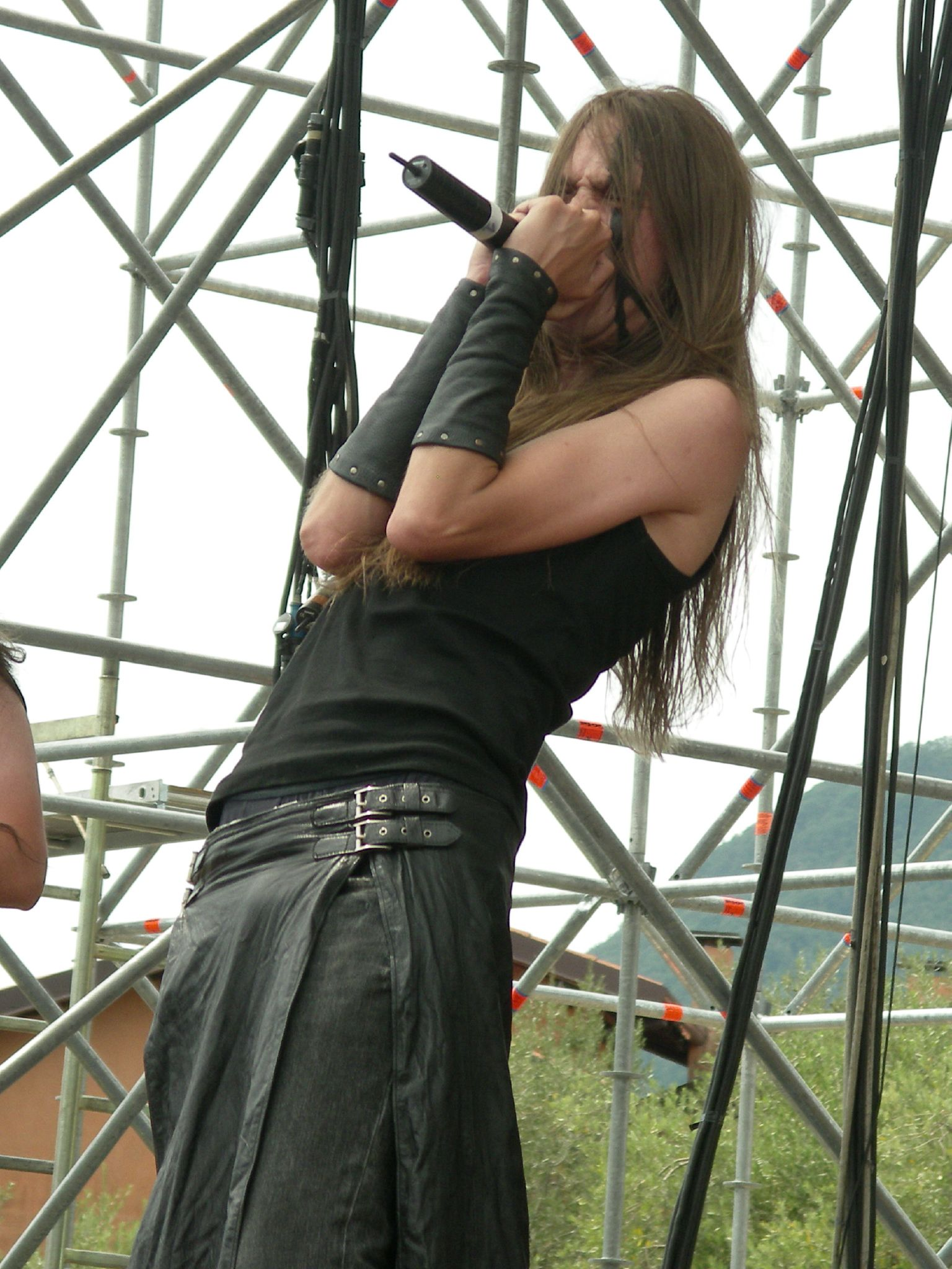 Finntroll live in 2006